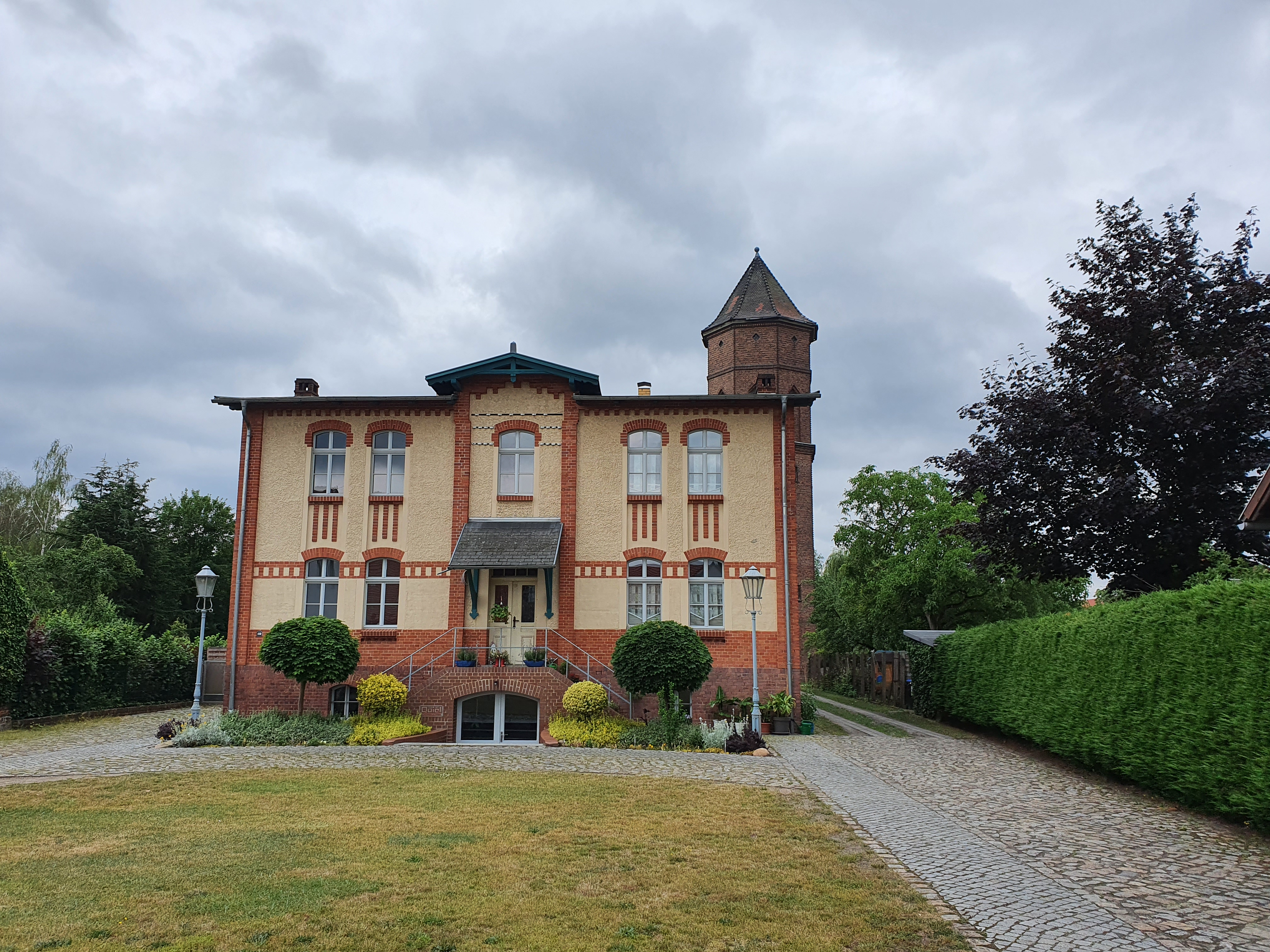 Das Lübbenauer Elektrizitätswerk wurde 1905 erbaut und versorgte die Stadt Lübbenau mit Licht und elektrischem Strom. Es befindet sich in der Max-Plessner-Straße im historischen Lübbenauer Vorort Recklin.